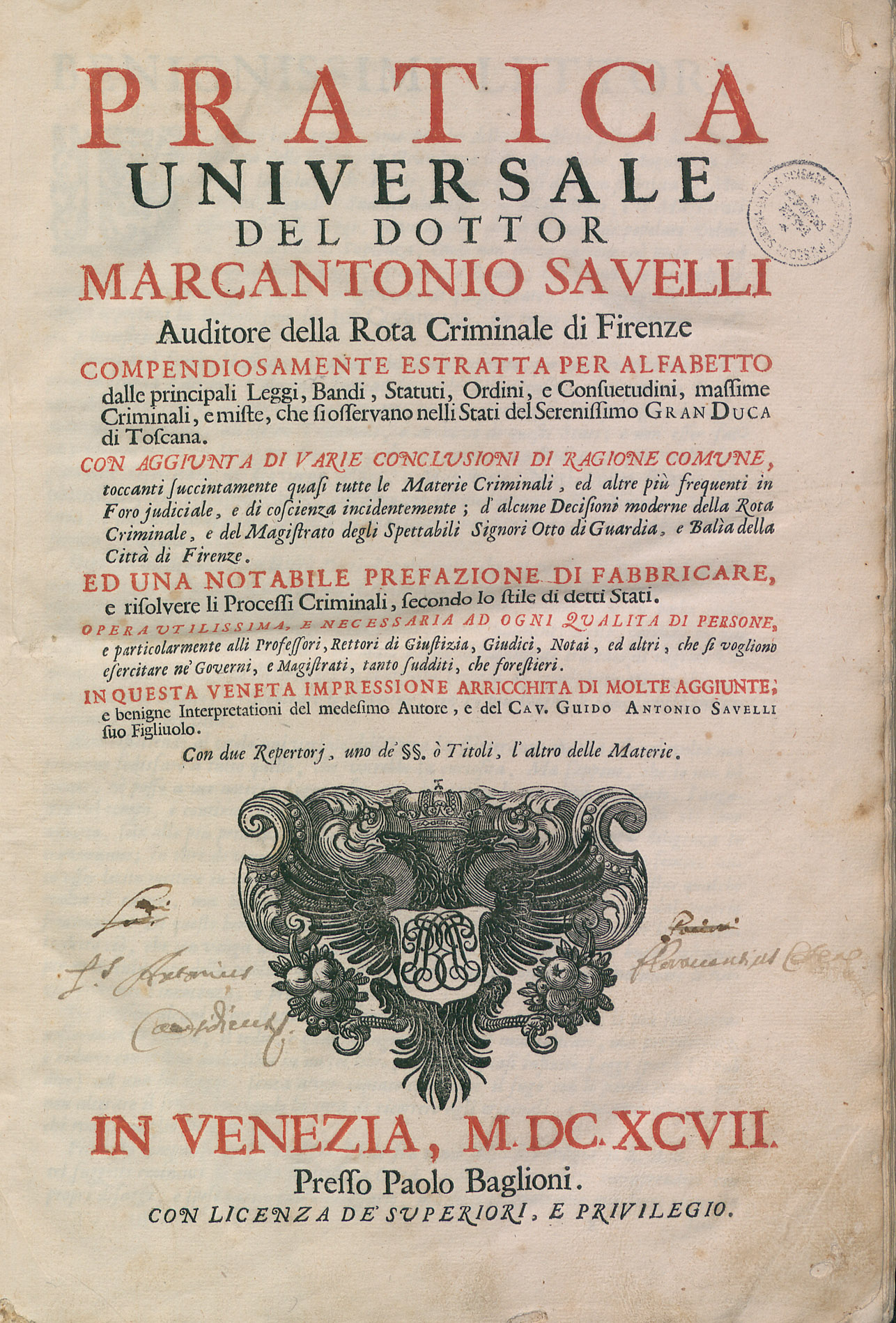 Frontespizio